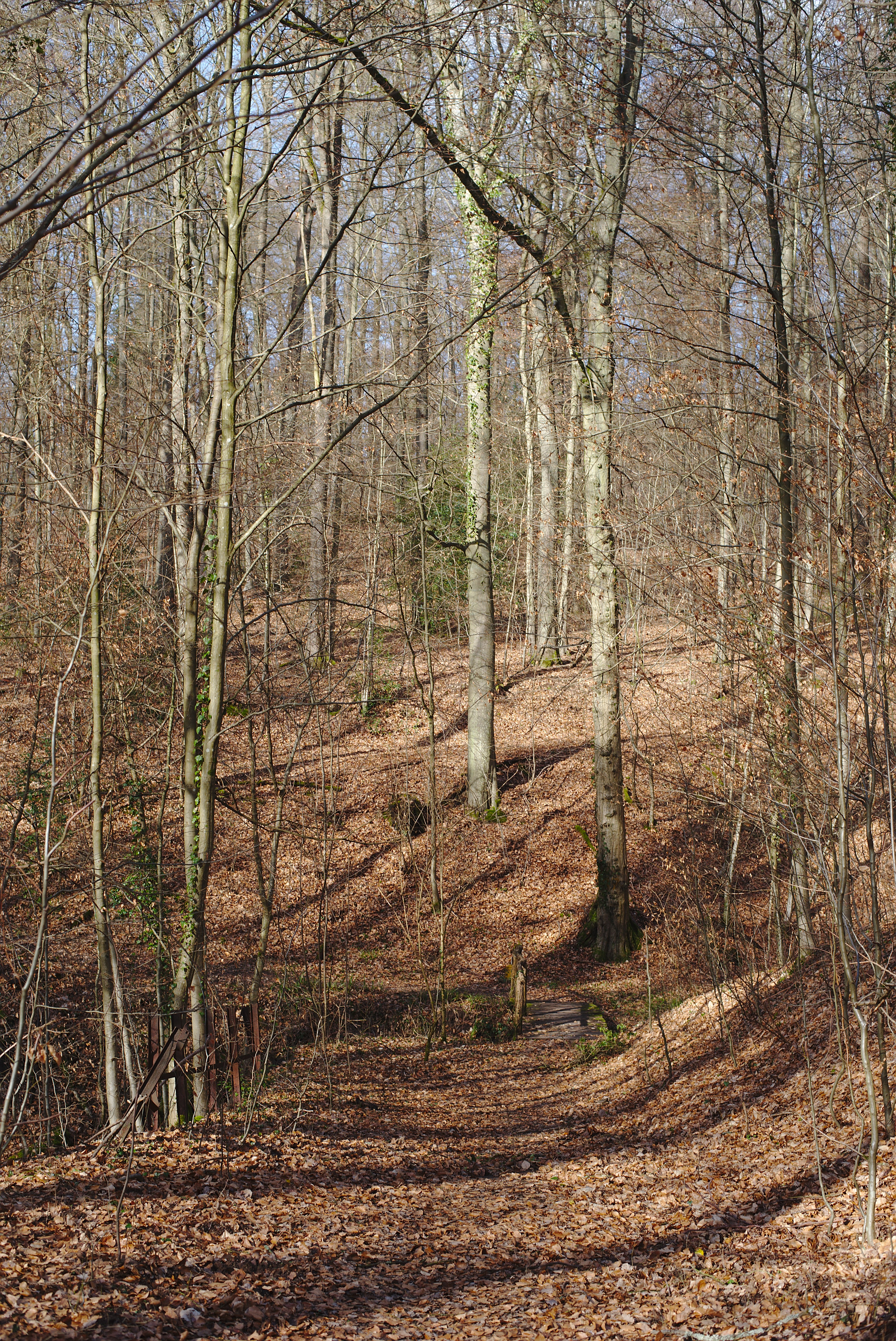 Der ehemalige Bergmannspfad im Staatsforst Saarbrücken, nahe Von Der Heydt